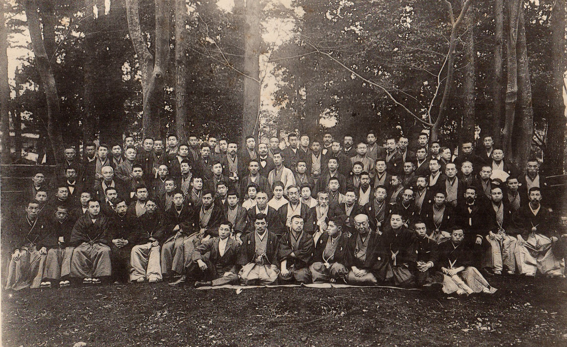 玉章画塾「天真社」明治３５年頃